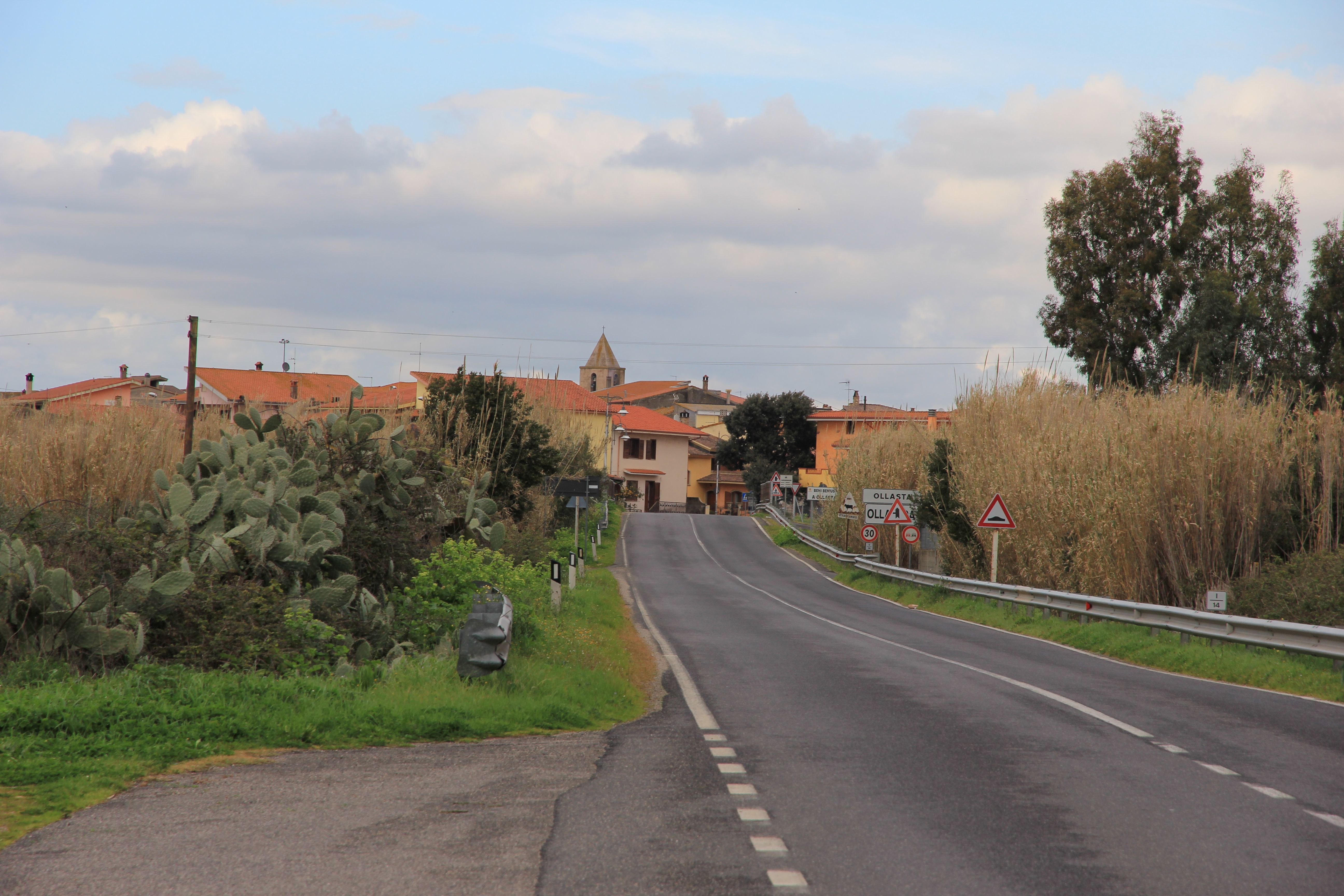 Ollastra